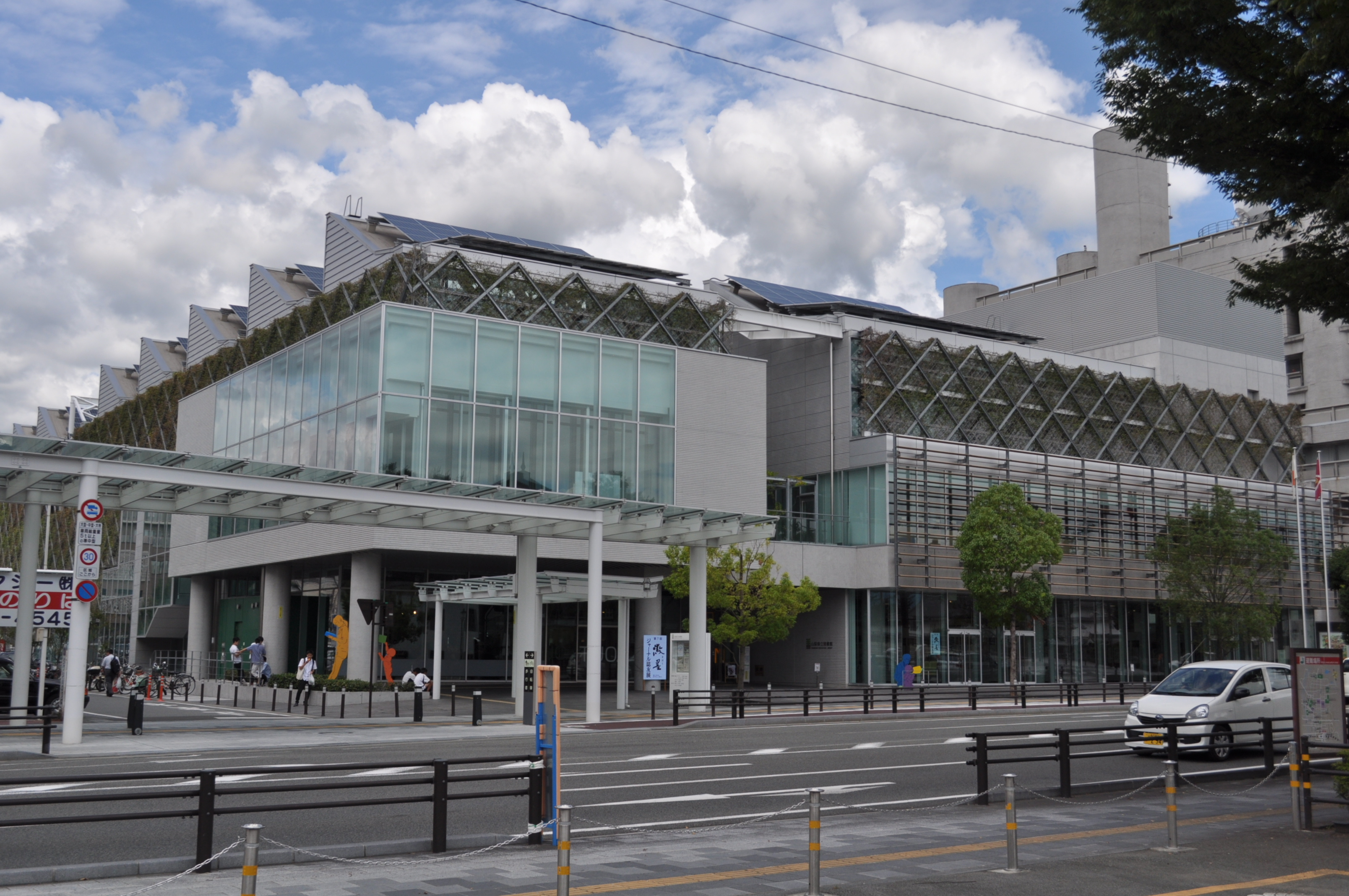 山梨県図書館